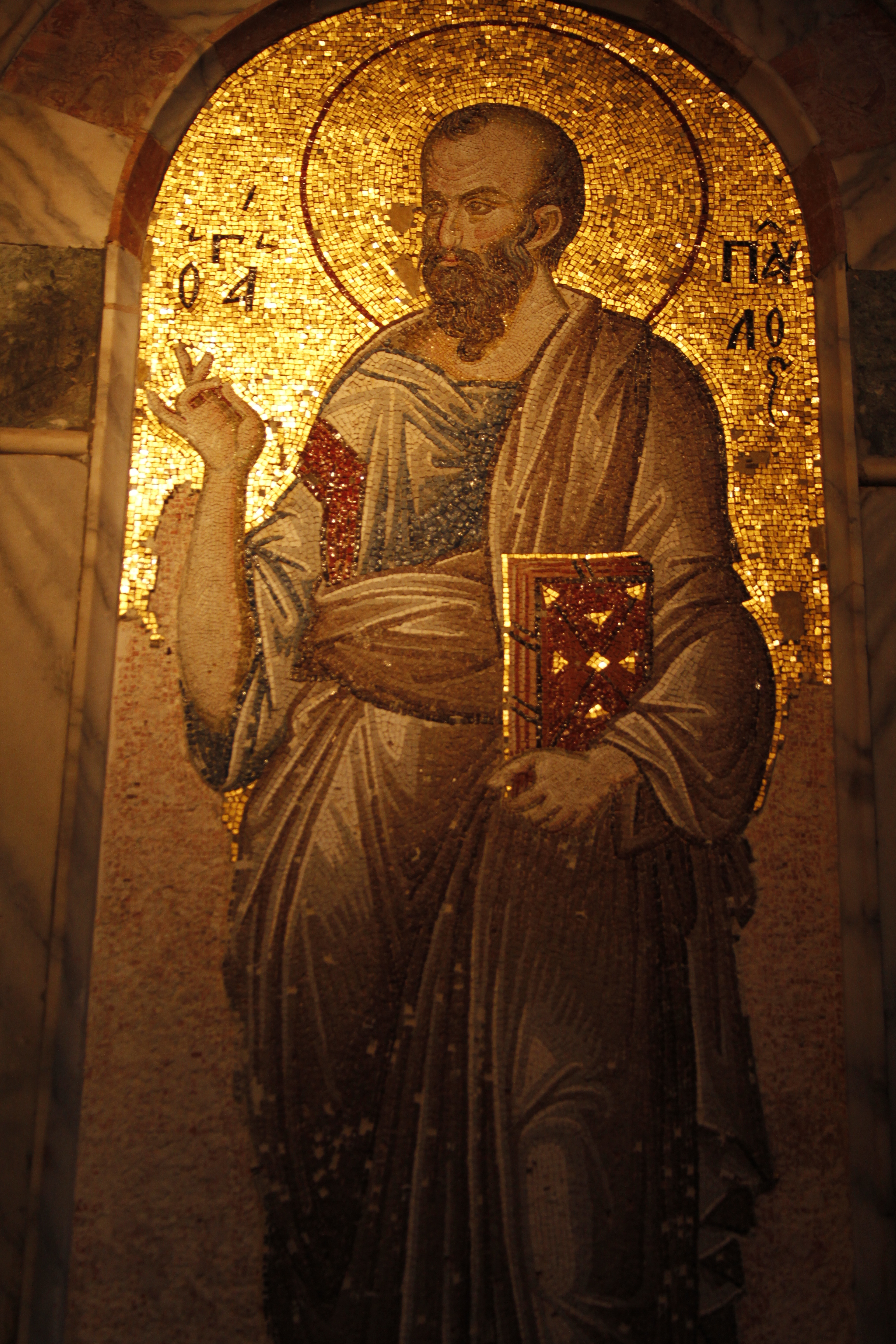 Mosaico de São Paulo na Igreja de Chora